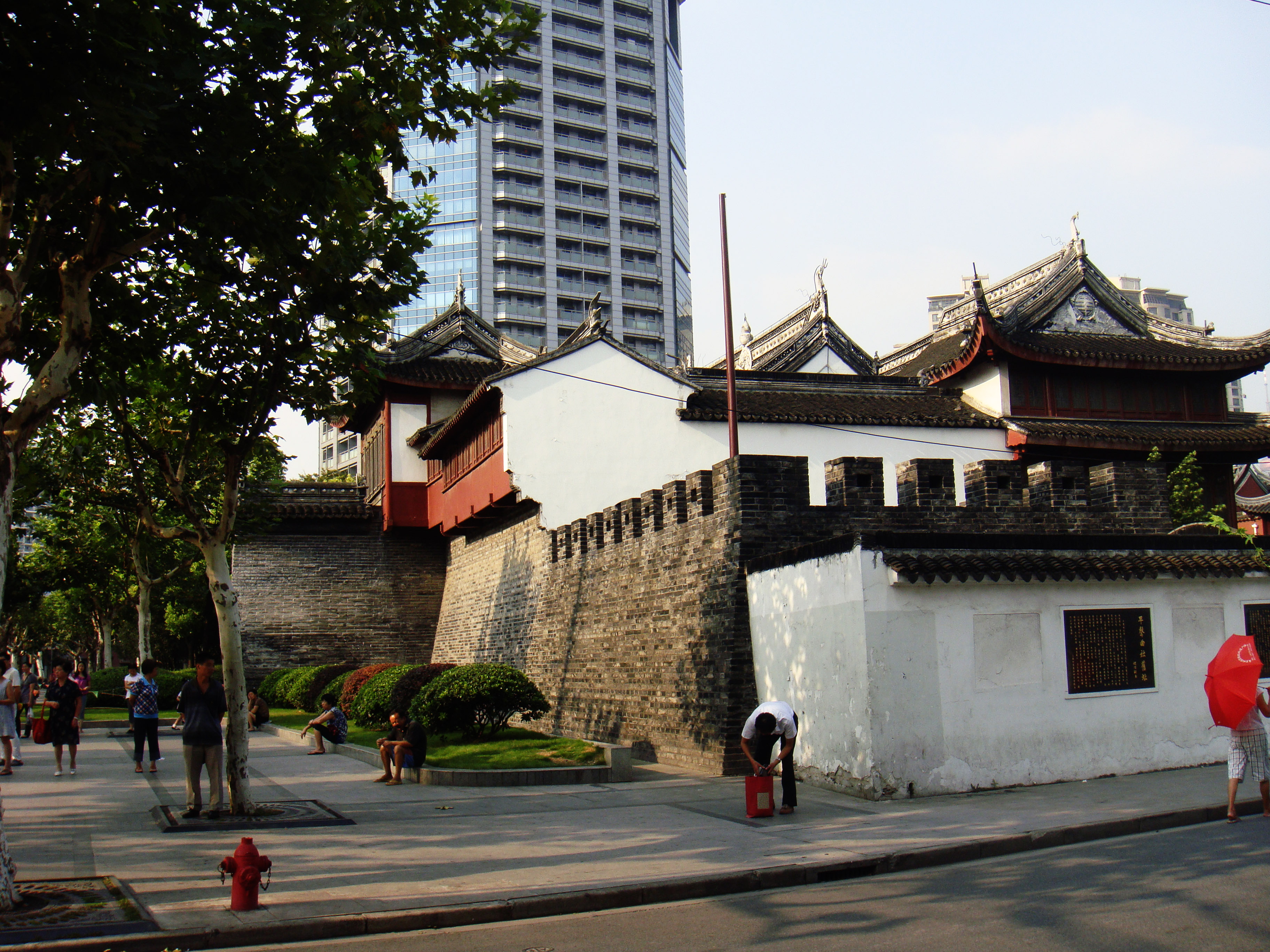 人民路邊上的大境閣